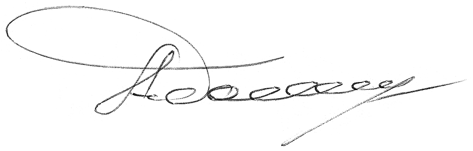 Подпись Банников, Андрей Григорьевич